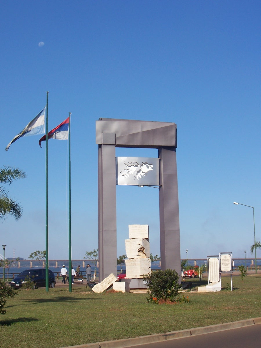 El Monumento a los Caídos en Malvinas, ubicado en la avenida Costanera de la ciudad de Posadas, Misiones, Argentina.